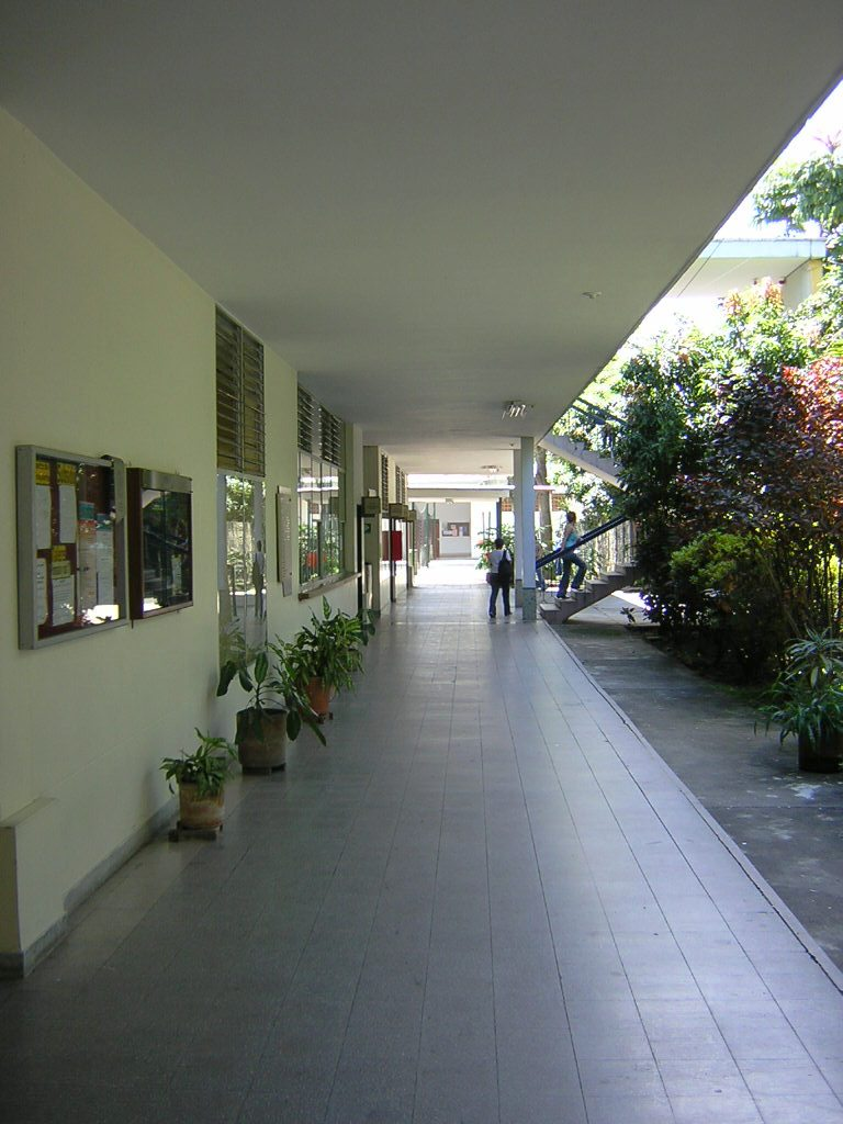 Ciudadela Robledo, Universidad de Antioquia. Medellín, Colombia.